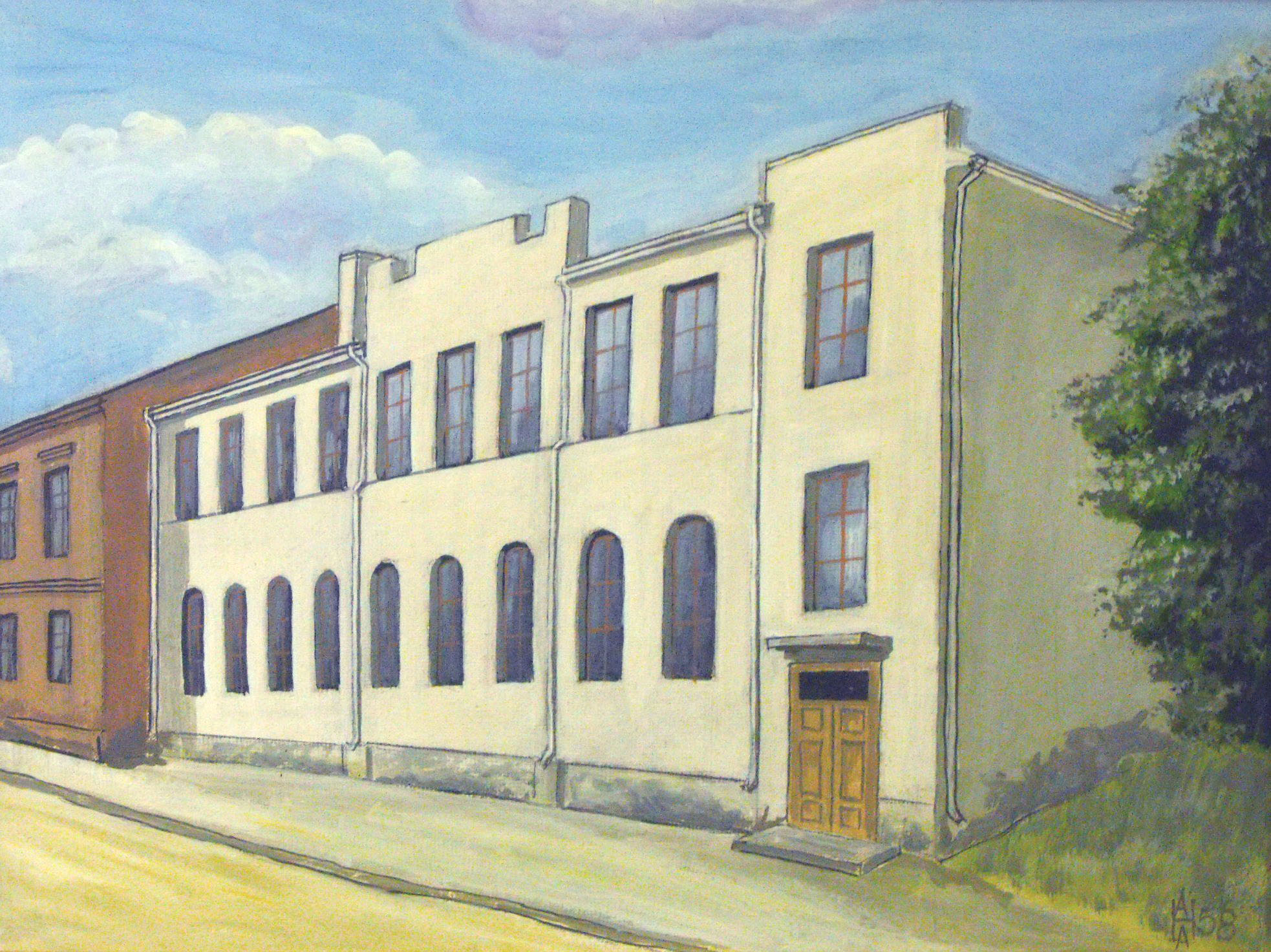 Минск, улица Островского (Раковская). 1958 год. Кинотеатр. Ранее в этом доме была синагога Зальцмана. Картина написана по акварели 1958 года в 1969 году. На акварели, справа над дверью, висела реклама фильма. Яичная темпера. ДВП. Художник - Анатолий Наливаев. Подарена автором минскому Музею истории и культуры евреев Беларуси.